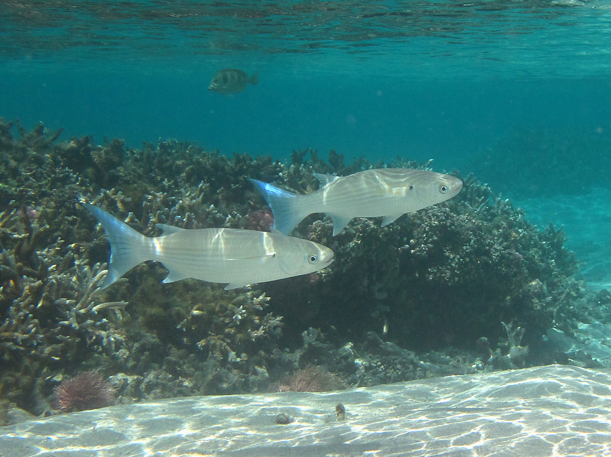 Un mulet à queue bleue (Crenimugil crenilabis) à la Réunion.